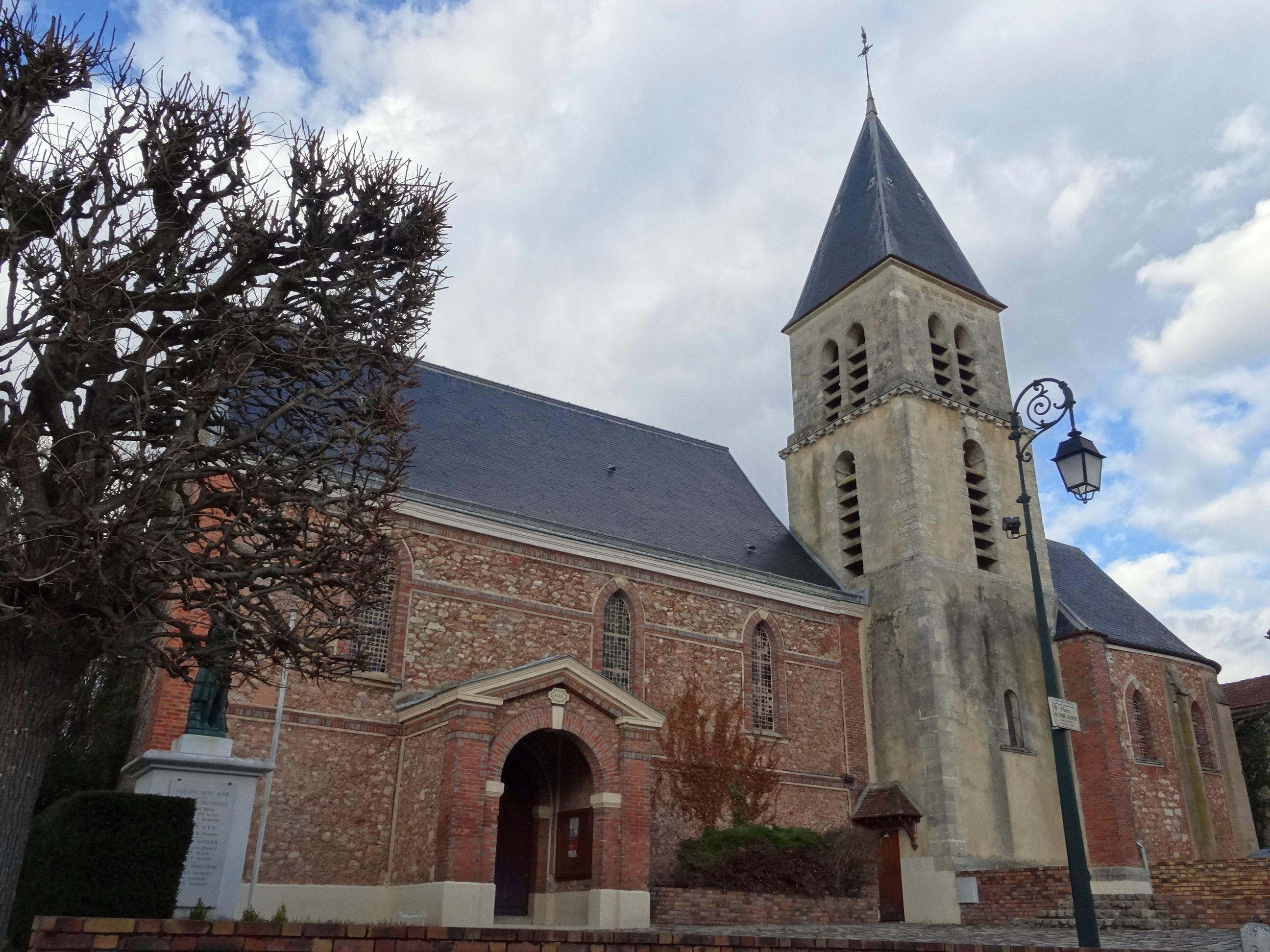 Église Notre-Dame de Pringy. (Seine-et-Marne, région Île-de-France).